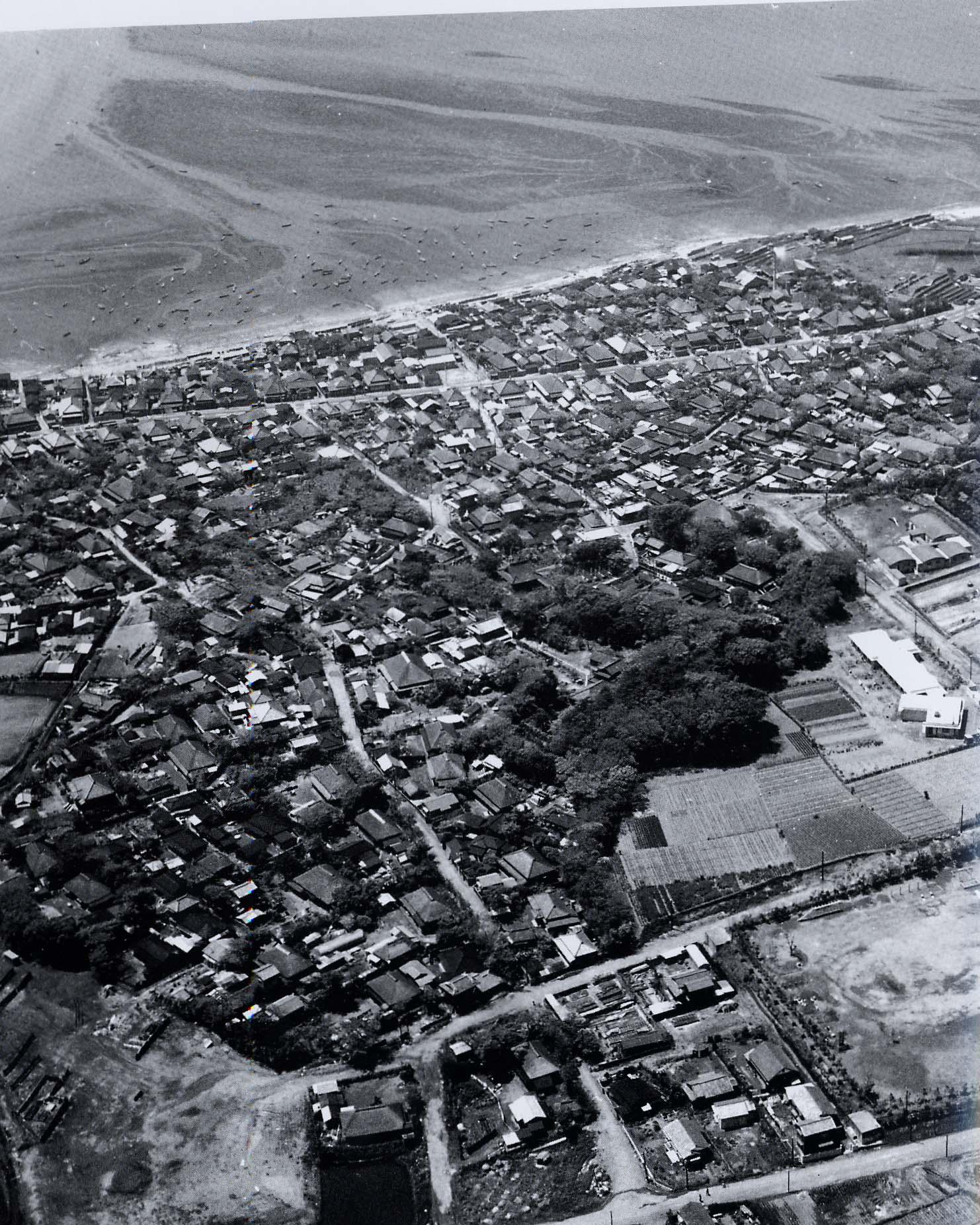 鷺沼の昭和30年代の航空写真。手前に東西に走っている道路は現在の市役所通り。写真右横の広場が鷺沼小学校。海岸沿いの道は国道14号。写真の干潟は東京湾で袖ヶ浦と呼ばれていた。浜辺は現在は埋め立てられ、袖ヶ浦団地となっている